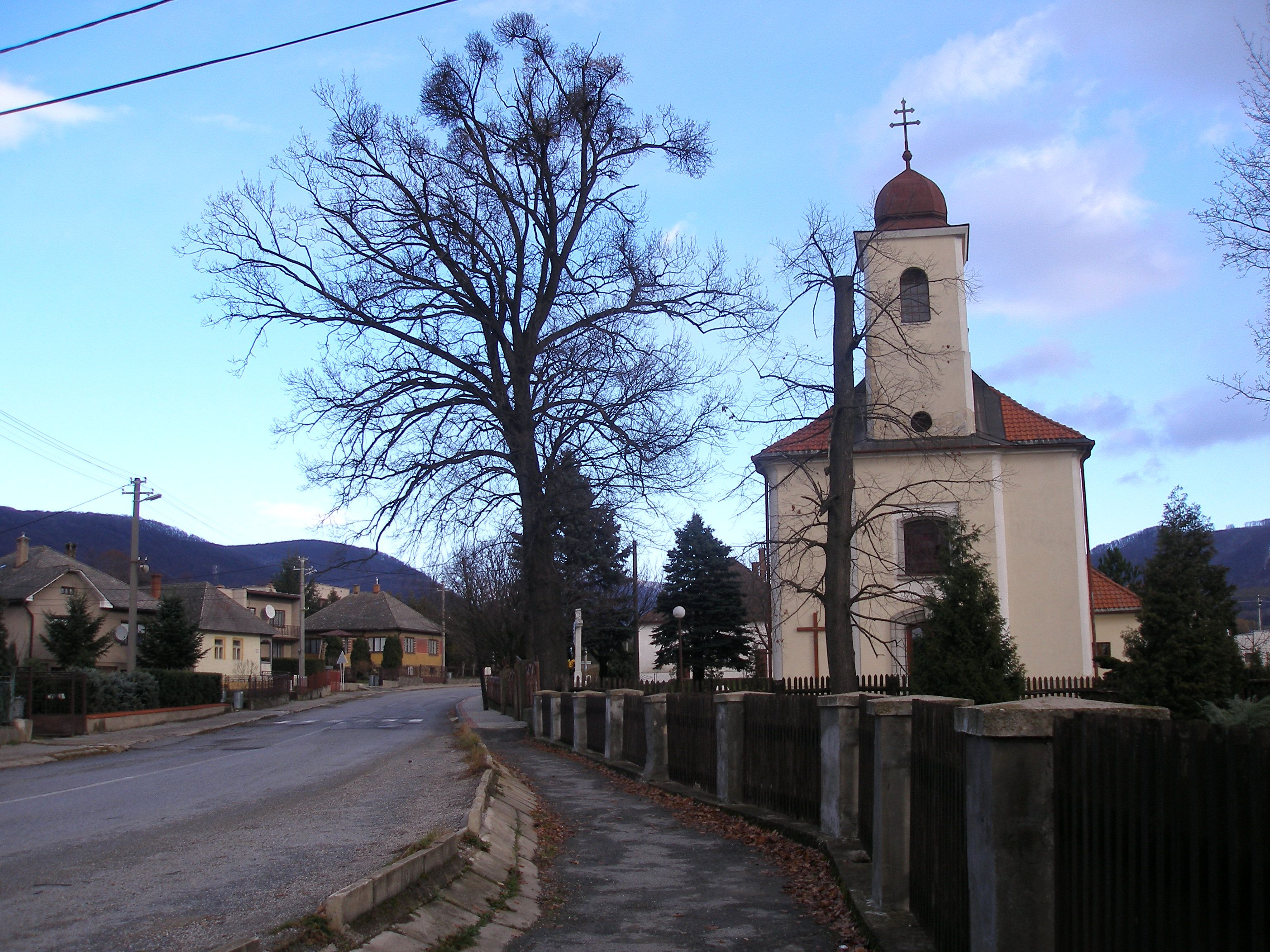 Obec Kokošovce v okrese Prešov